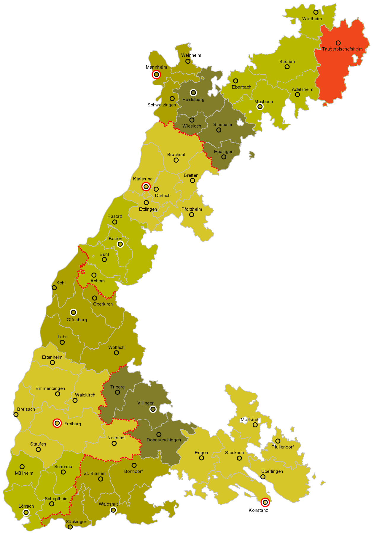 Lage des Bezirksamts Tauberbischofsheim, bearbeitete Karte, farblich markiert. Die Karte zeigt die Verwaltungsgliederung Badens (Bezirksämter, Kreise, Landeskommissärbezirke), Stand 1890.